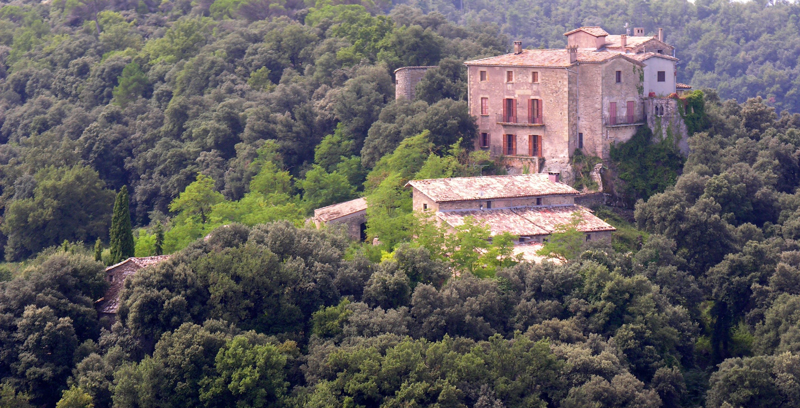 Castell de Savassona (Tavèrnoles)